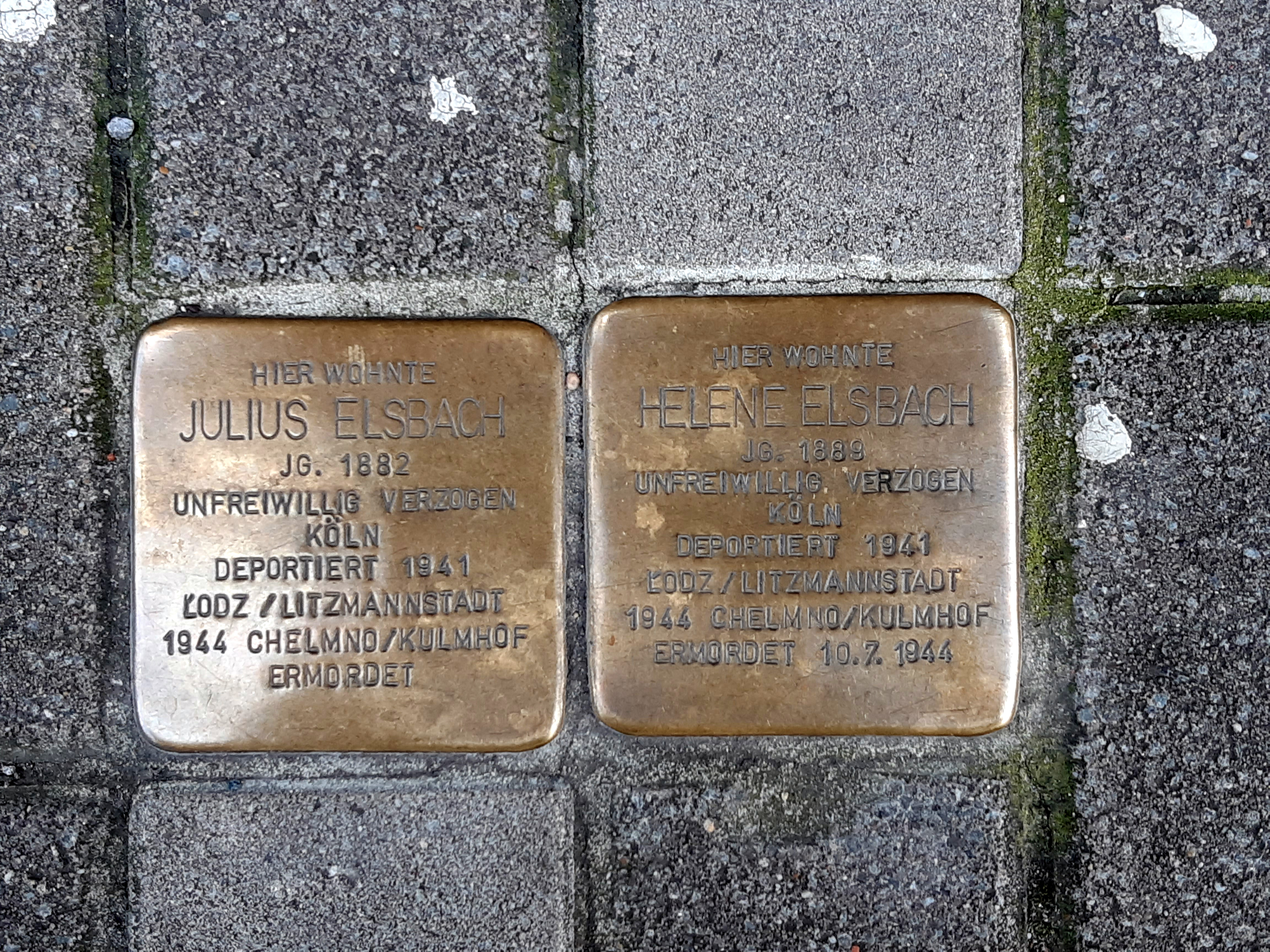 Stolpersteine am Haus Hermannstr. 30 in Dortmund